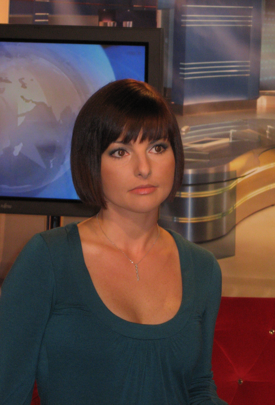 Beata Chmielowska-Olech na dniu Otwartym TVP